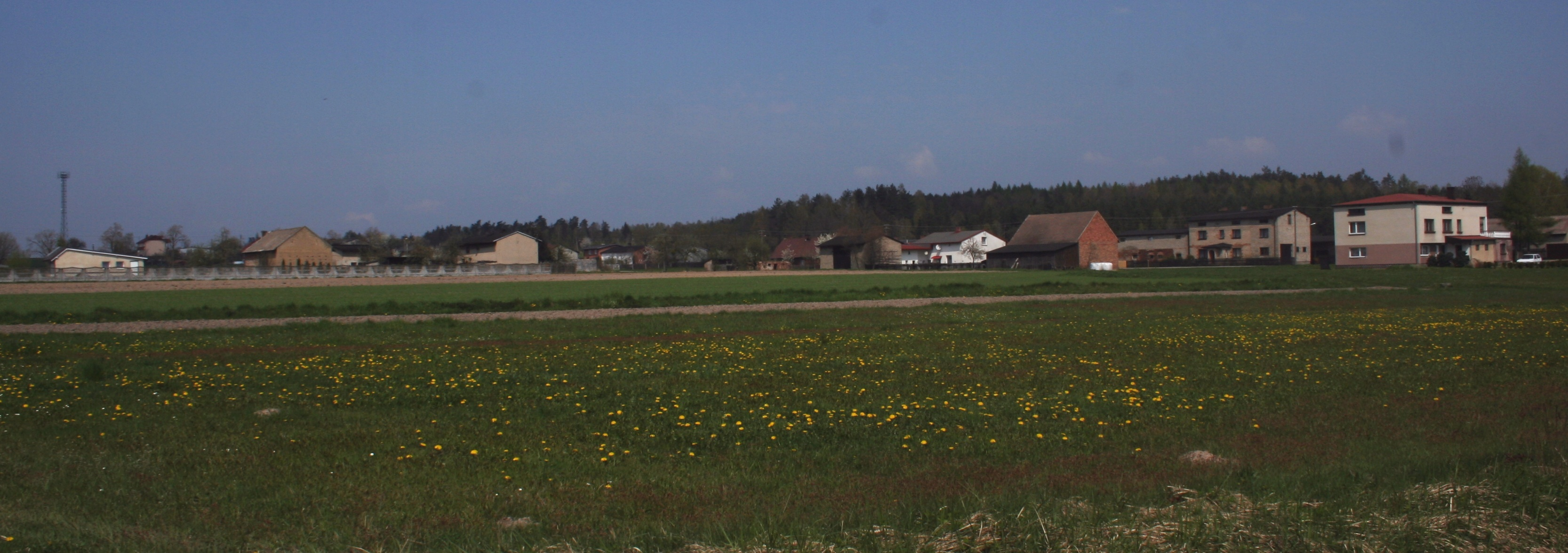 Panorama fragmentu miejscowości Dębowa Góra, Polska, województwo śląskie, powiat lubliniecki